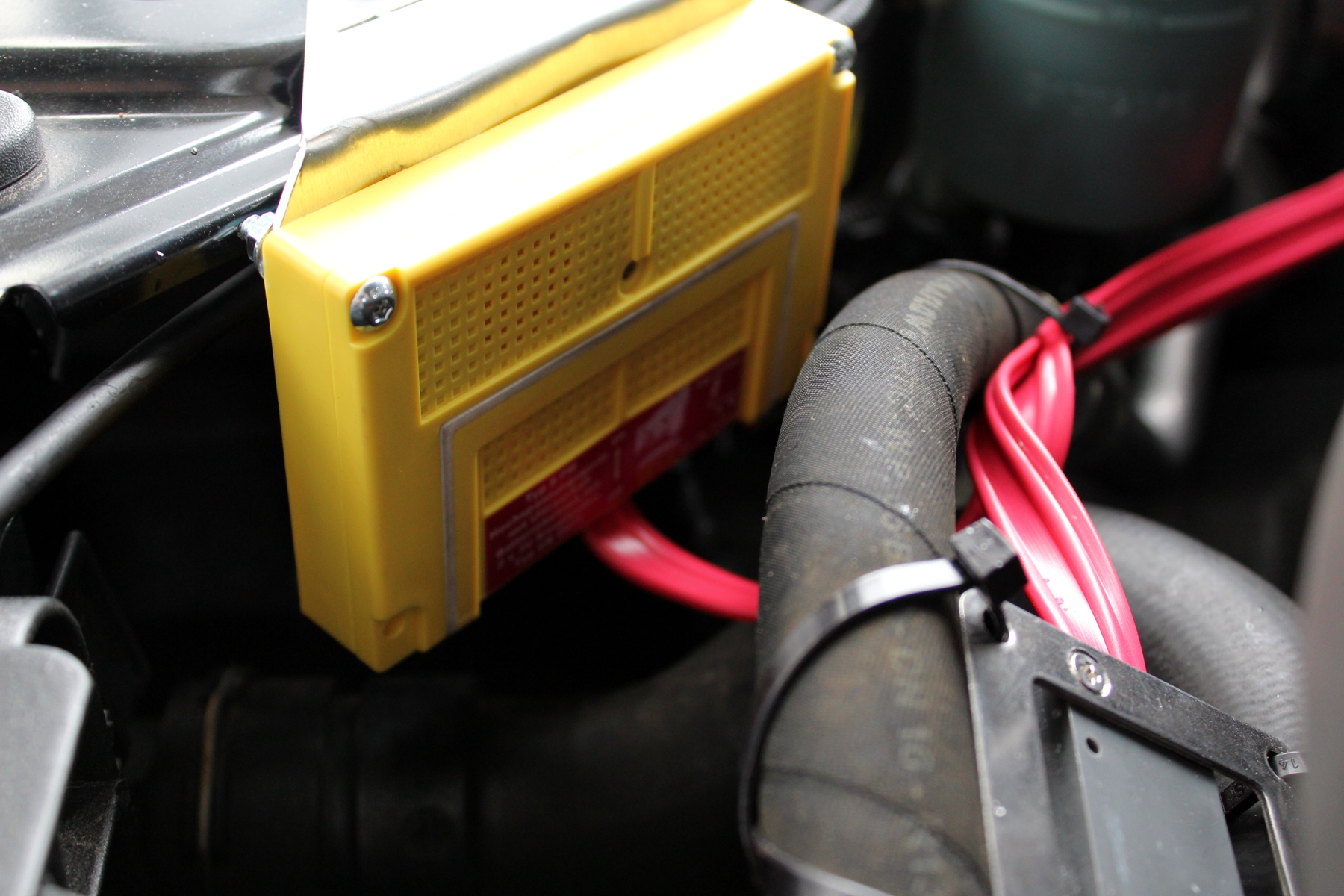 Sensorgesteuertes Hochspannungsgerät mit einer von 6 sichtbaren Edelstahlkontaktplatten im Motorraum